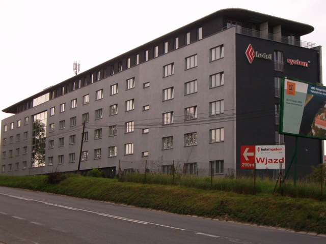 Kraków-Hotel System